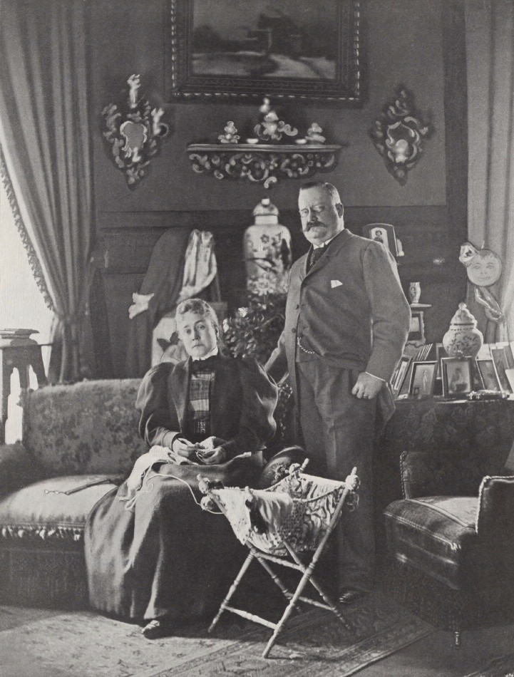 Wilhelm von Hohenthal (1853-1909), Politiker im Königreich Sachsen, und seine Ehefrau. (Aufnahme von 1899 oder früher).